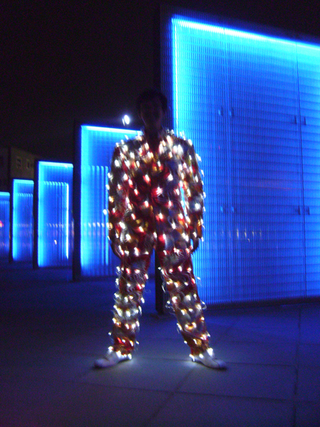 「電飾打掛スーツ」を着る作家自身（横浜・象の鼻パークにて）